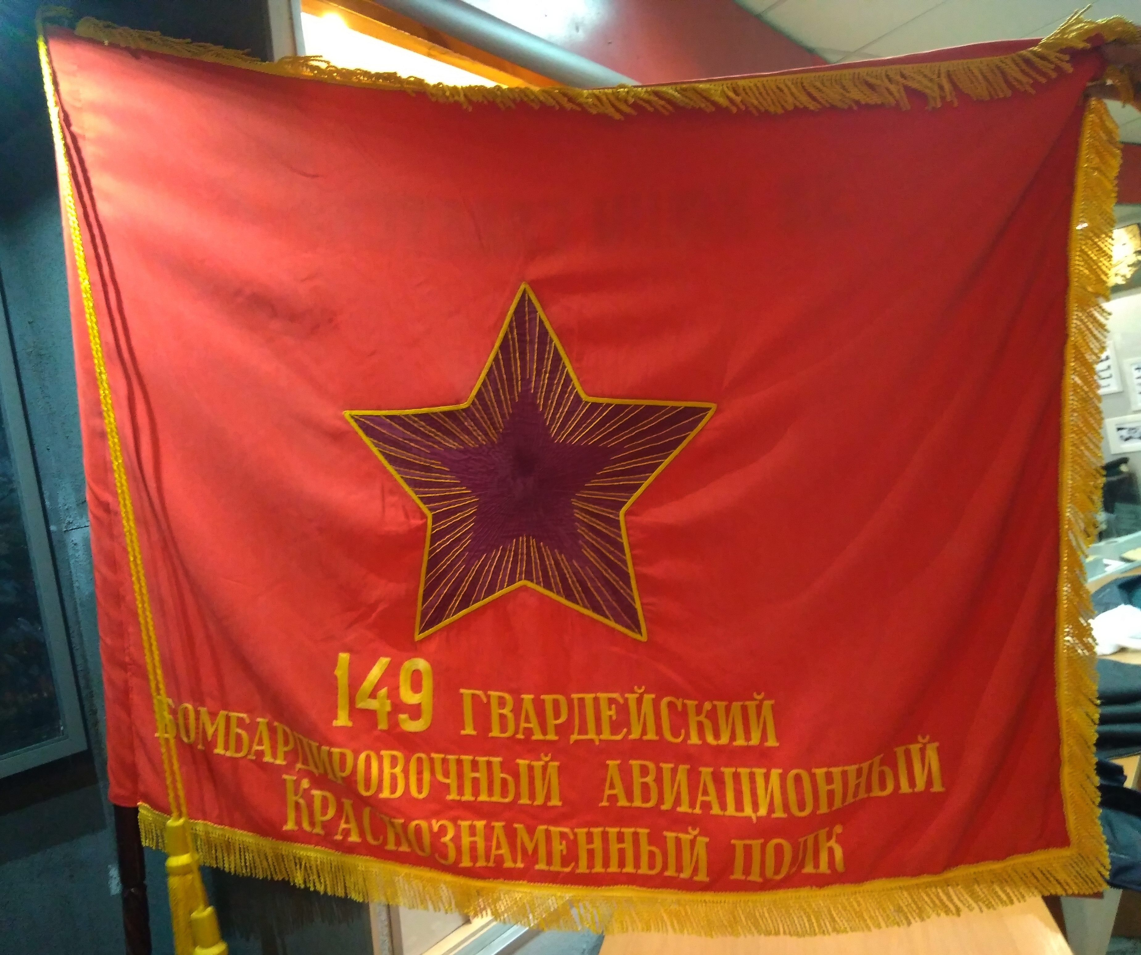 Экспозиция в музее Дома офицеров в Алматы